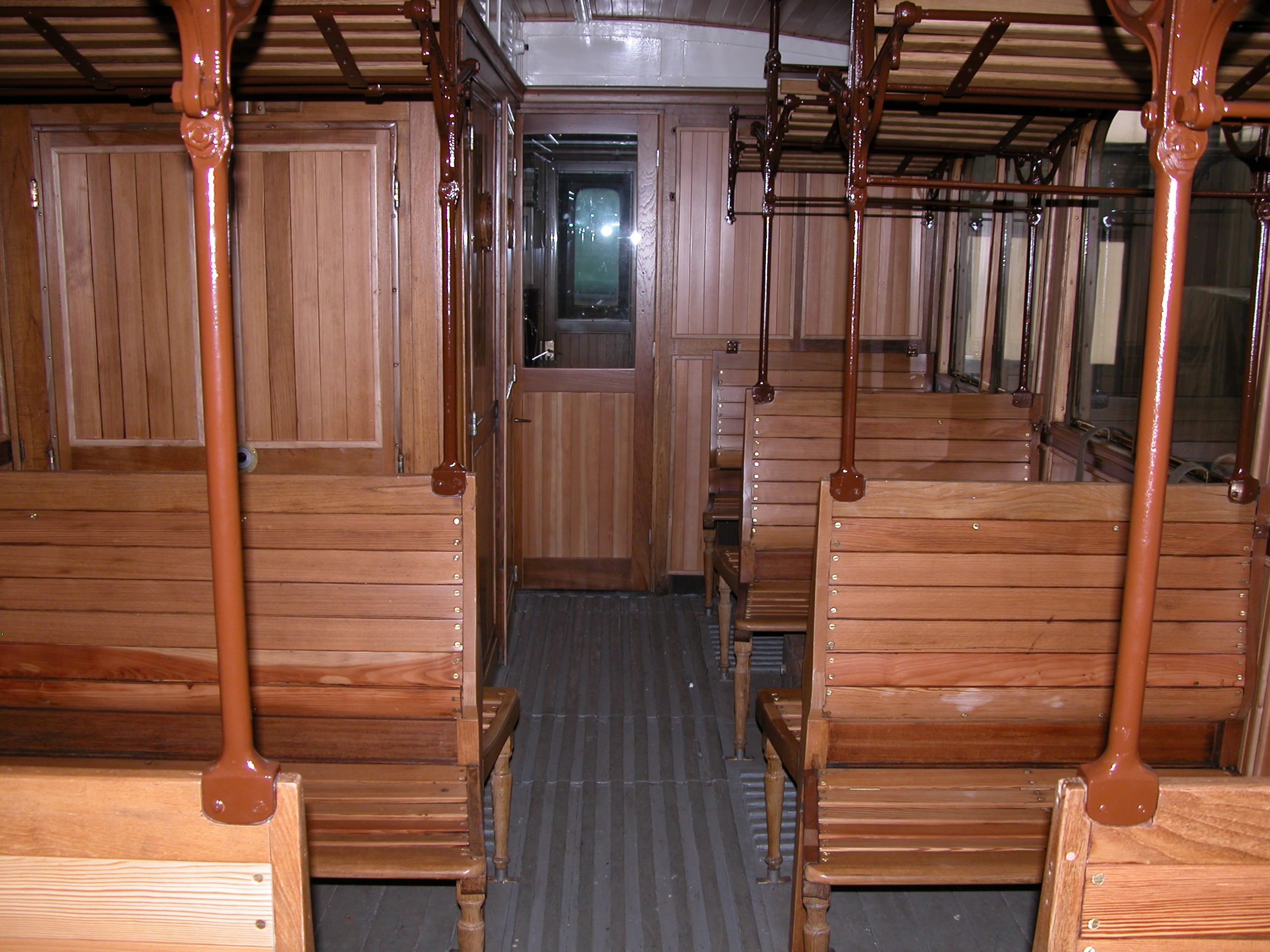 Automotrice elettrica FTC 16 – Scompartimento di 2ª classe restaurato.